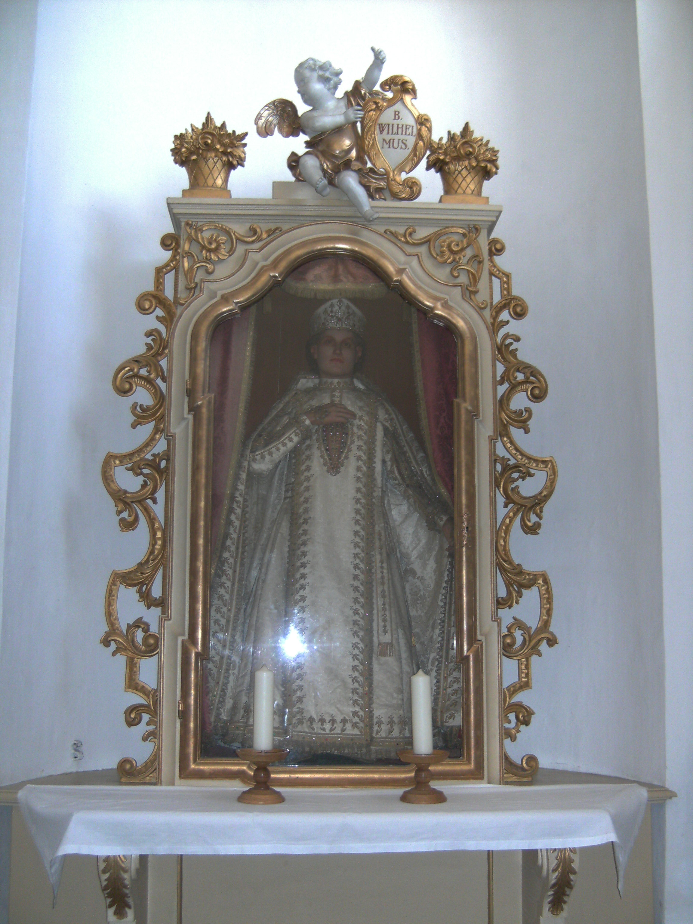 Ganzkörperreliquie Sel. Wilhelmus Eiselin